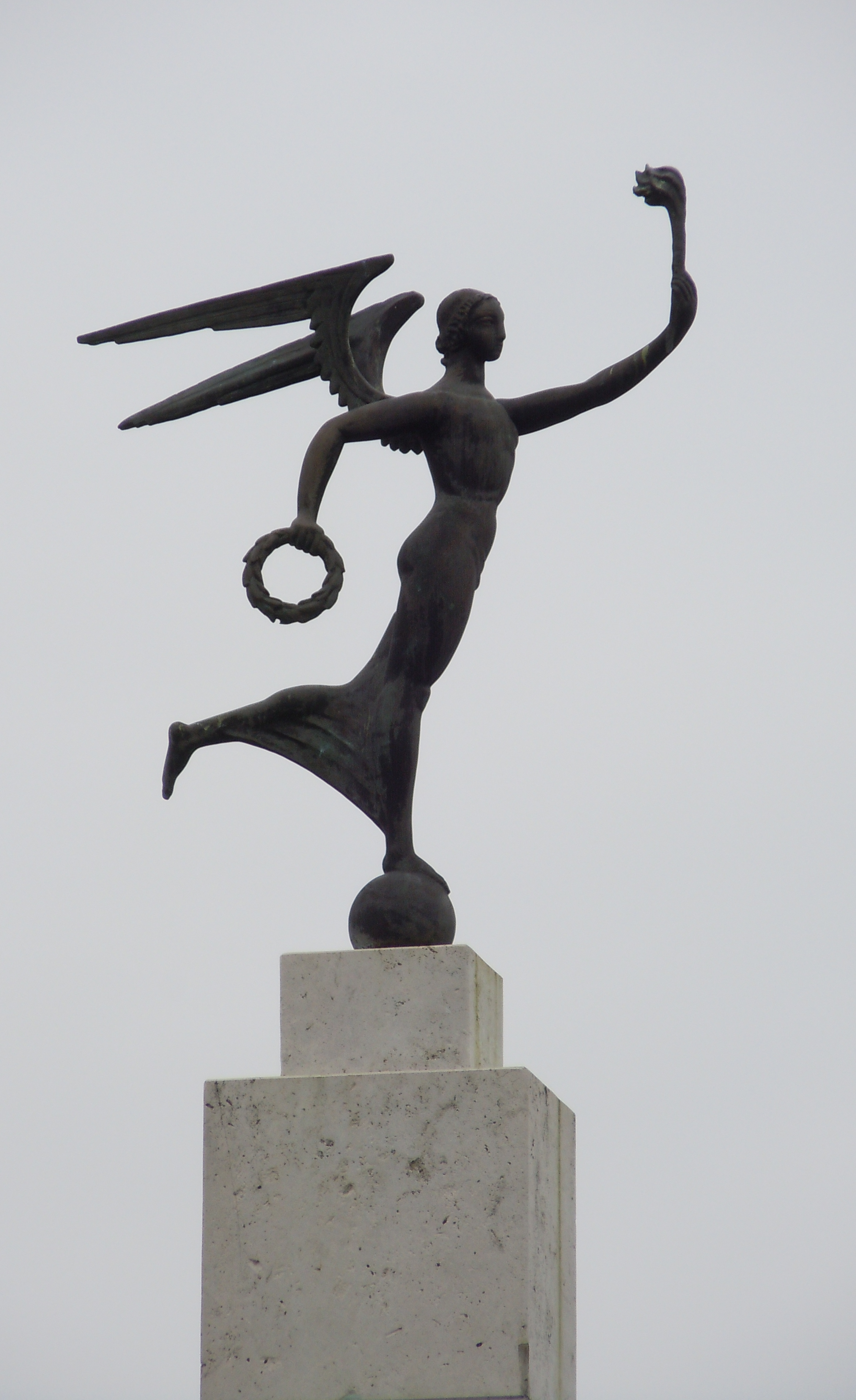 Magyar László emlékmű (Rumi Rajki István, Tóth János, 1938), Károlyi Gáspár tér, Szombathely, Hungary